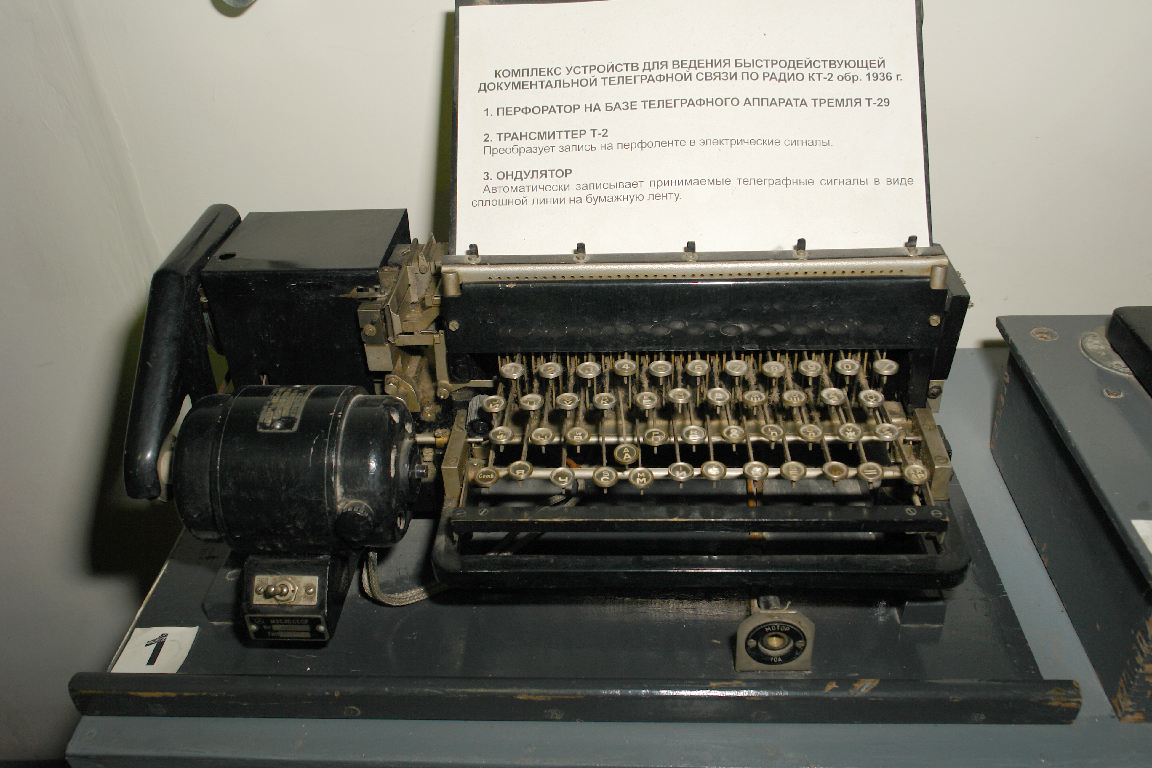 КОМПЛЕКС УСТРОЙСТВ ДЛЯ ВЕДЕНИЯ БЫСТРОДЕЙСТВУЮЩЕЙ ДОКУМЕНТАЛЬНОЙ ТЕЛЕГРАФНОЙ СВЯЗИ ПО РАДИО КТ-2 обр. 1936 г. 1. ПЕРФОРАТОР НА БАЗЕ ТЕЛЕГРАФНОГО АППАРАТА ТРЕМЛЯ Т-29 Военно-исторический музей артиллерии, инженерных войск и войск связи, Санкт-Петербург.